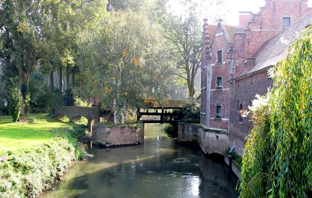 Gete - eigen foto